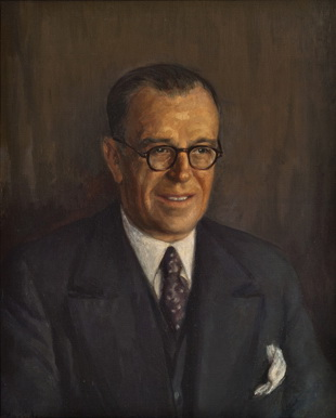 Blas Taracena Aguirre. Número de inventario: 1990-123-6.